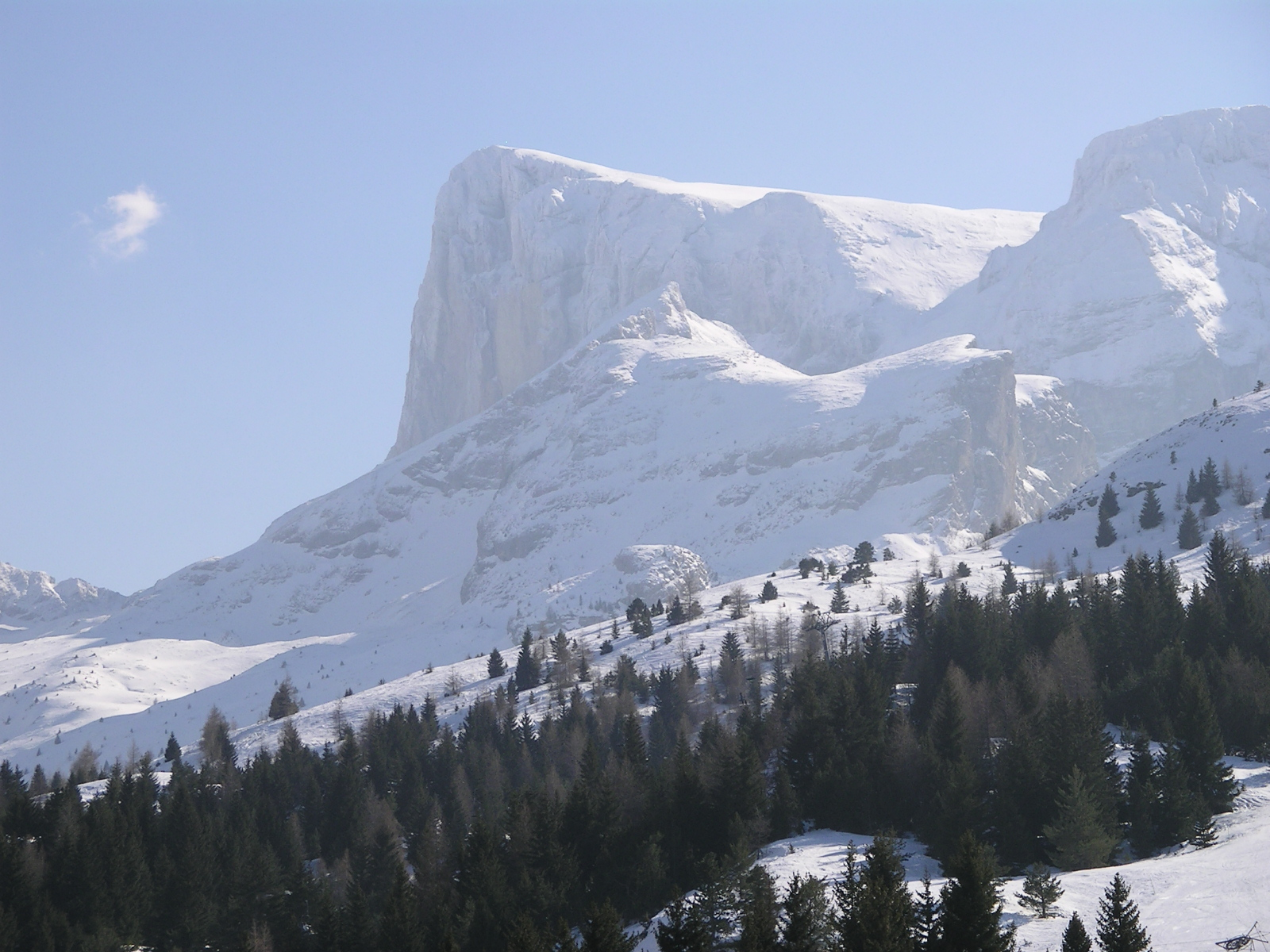 Pic de Bure depuis la station des Hautes-Alpes SuperDévoluy (SuperDévoluy - France) (2005)